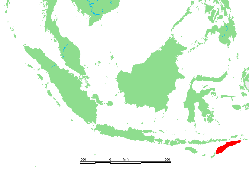 ID Tidore.PNG